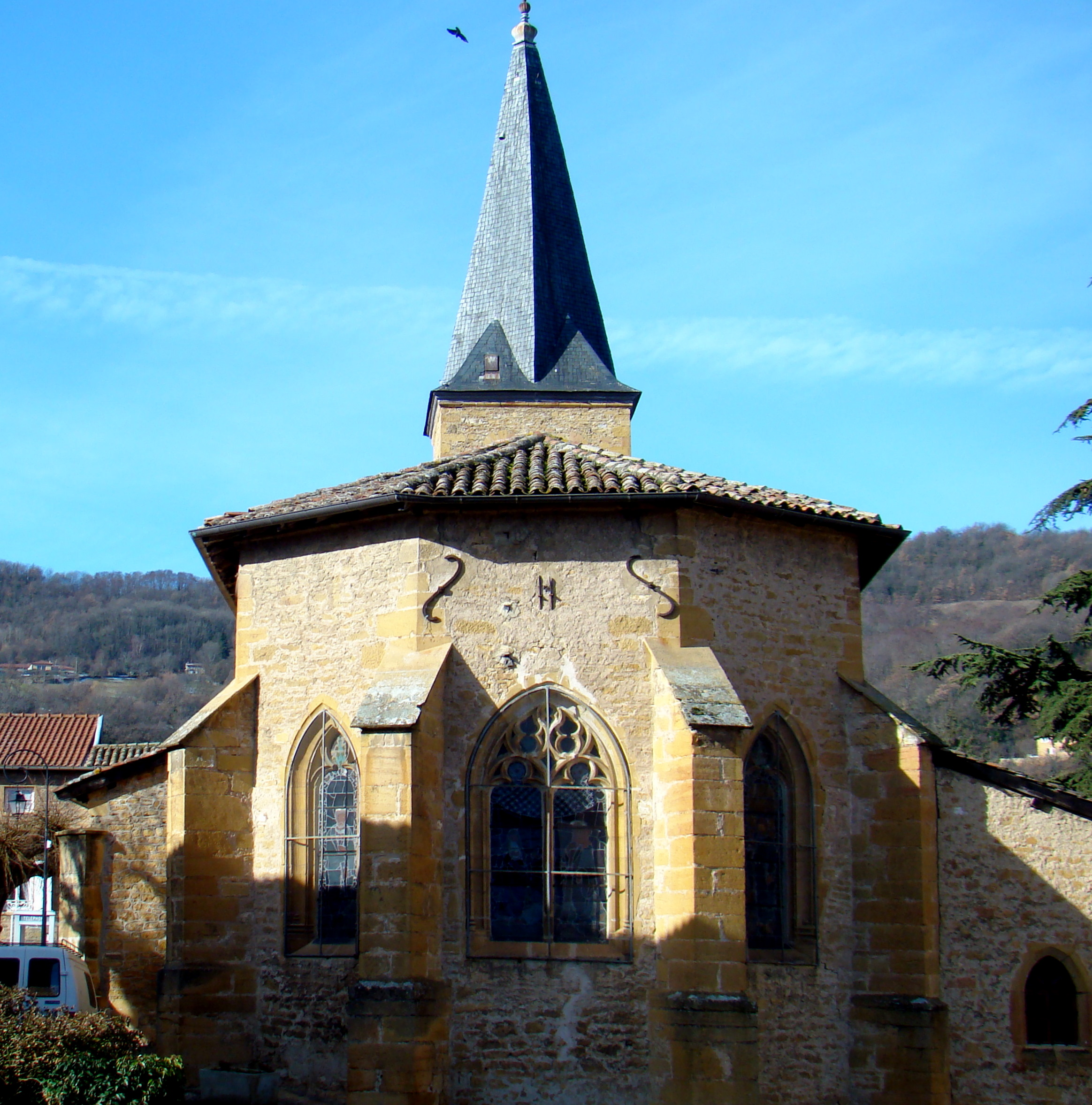 Église Saint-Martin de Ville-sur-Jarnioux, Le Bourg (Inscrit, 1979) .